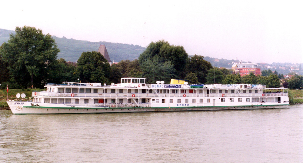 MS Dunaj in Krems.